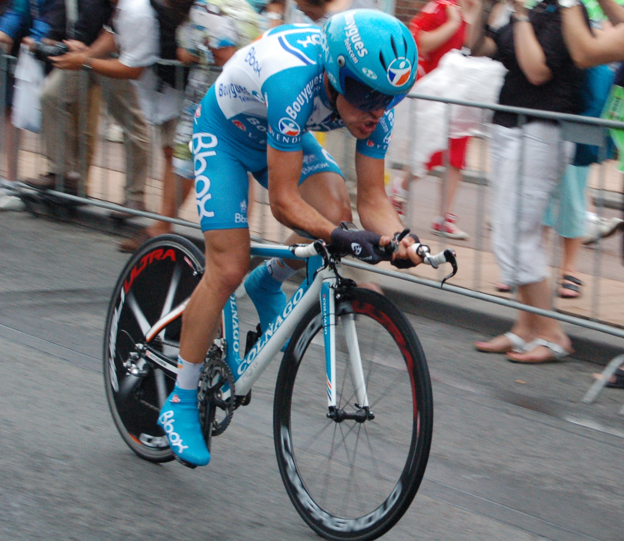 Prologue du Tour de France 2010 à Rotterdam - Anthony Charteau